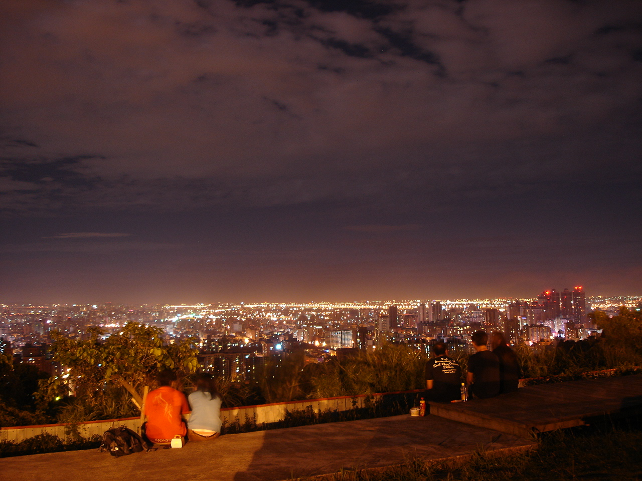 桃園市桃園區虎頭山環保公園夜景